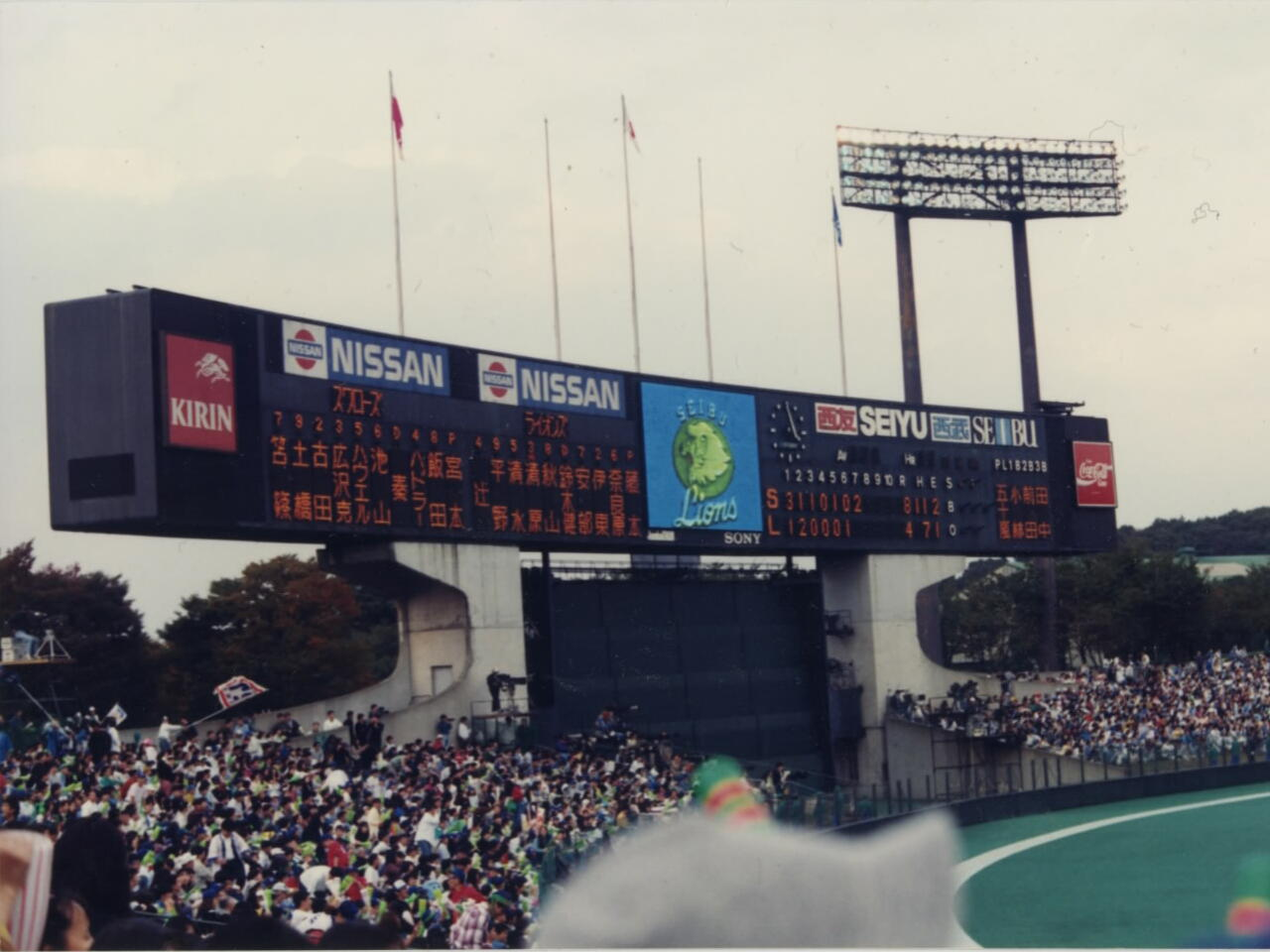 現在の「西武ドーム」の、屋根部分がない時代の写真。１９９３年１０月２３日、日本シリーズ第１戦（西武－ヤクルト）にて。 35mmフィルムで撮影し印画紙プリントしてあったものを、スキャナーにて取り込み、jpgデータにしたものです。